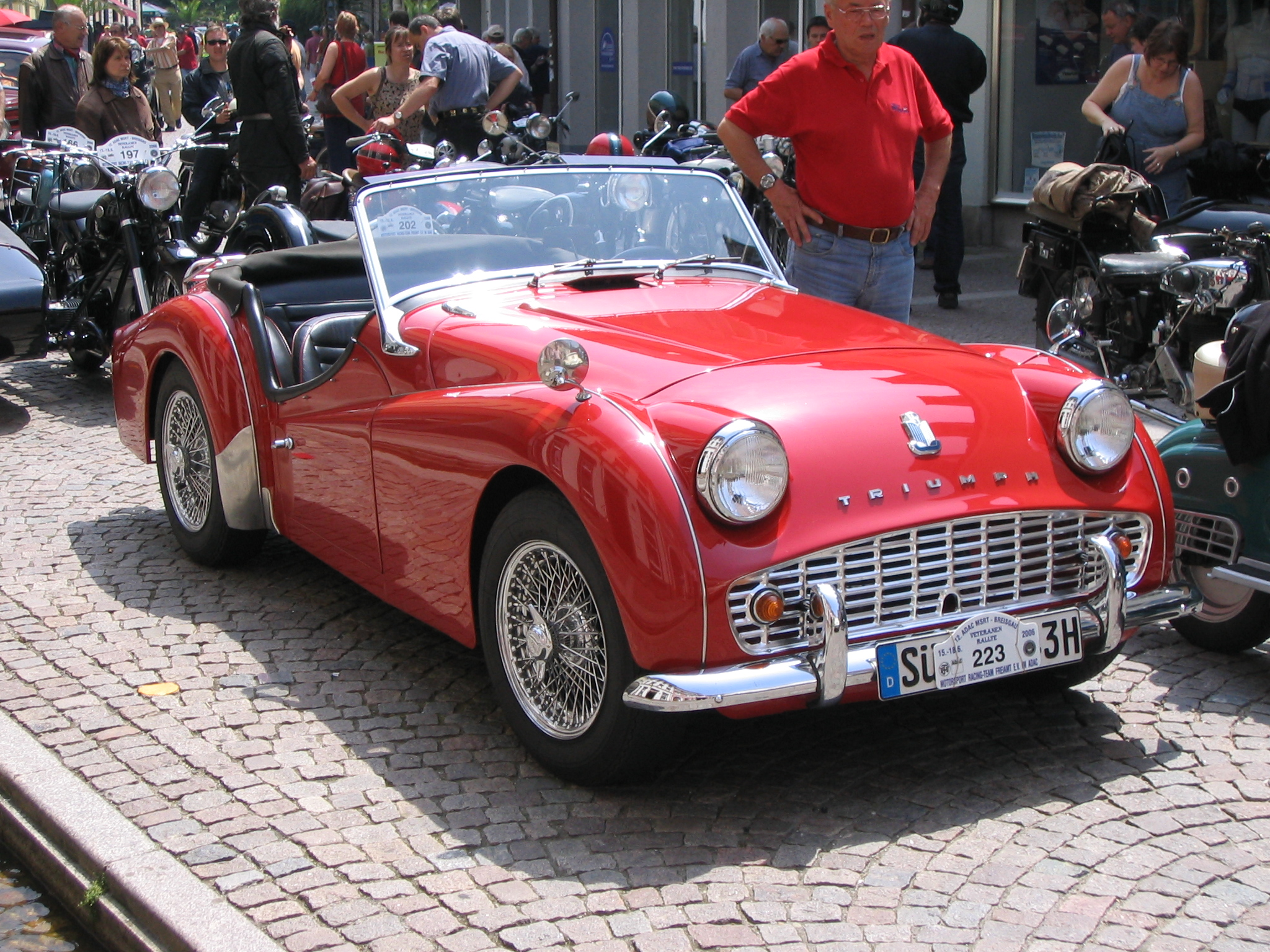 Triumph TR3, aufgenommen während eines Oldtimer-Treffens im Emmendingen, Deutschland